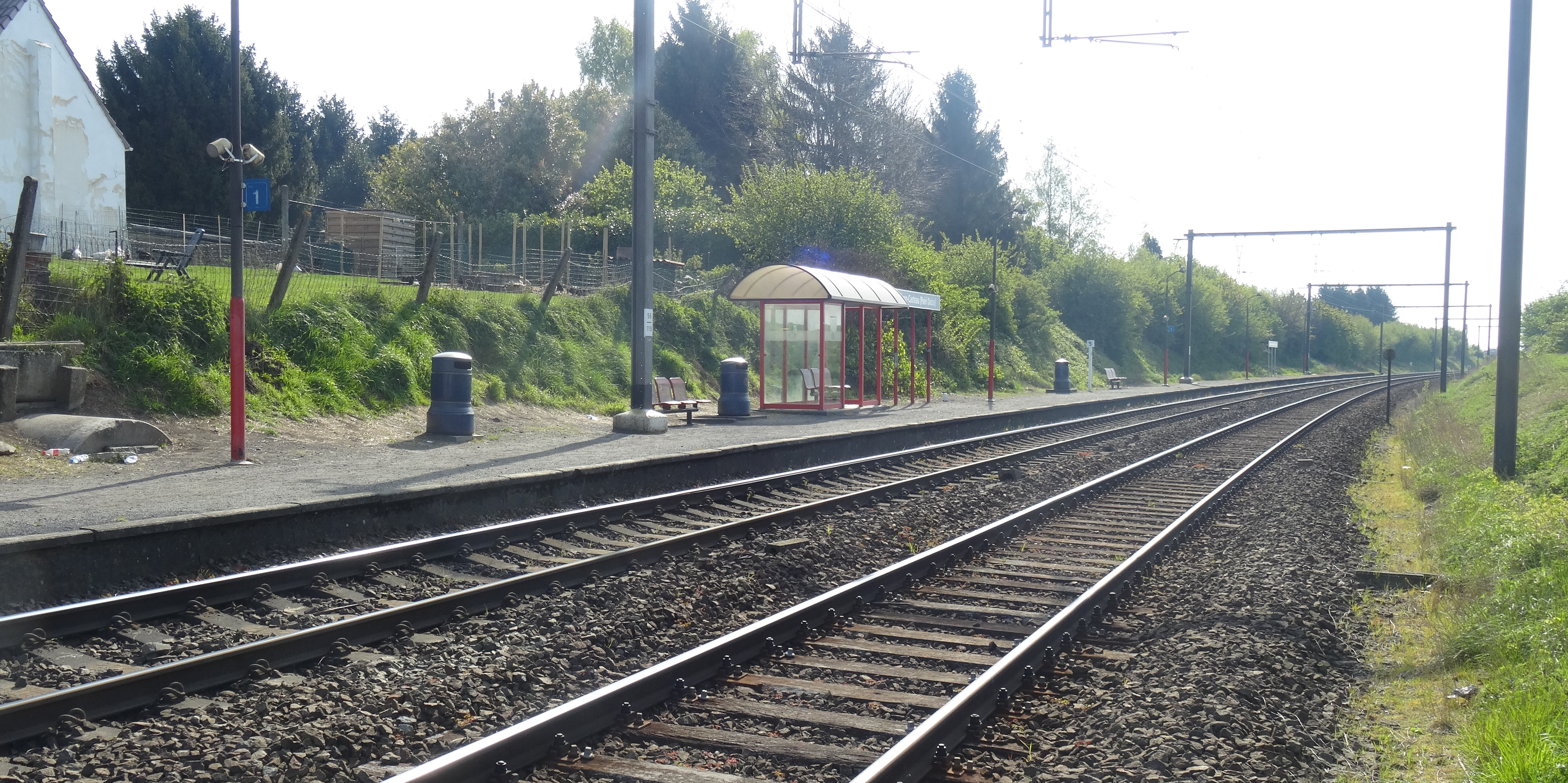 Gare de Cambron-Casteau.